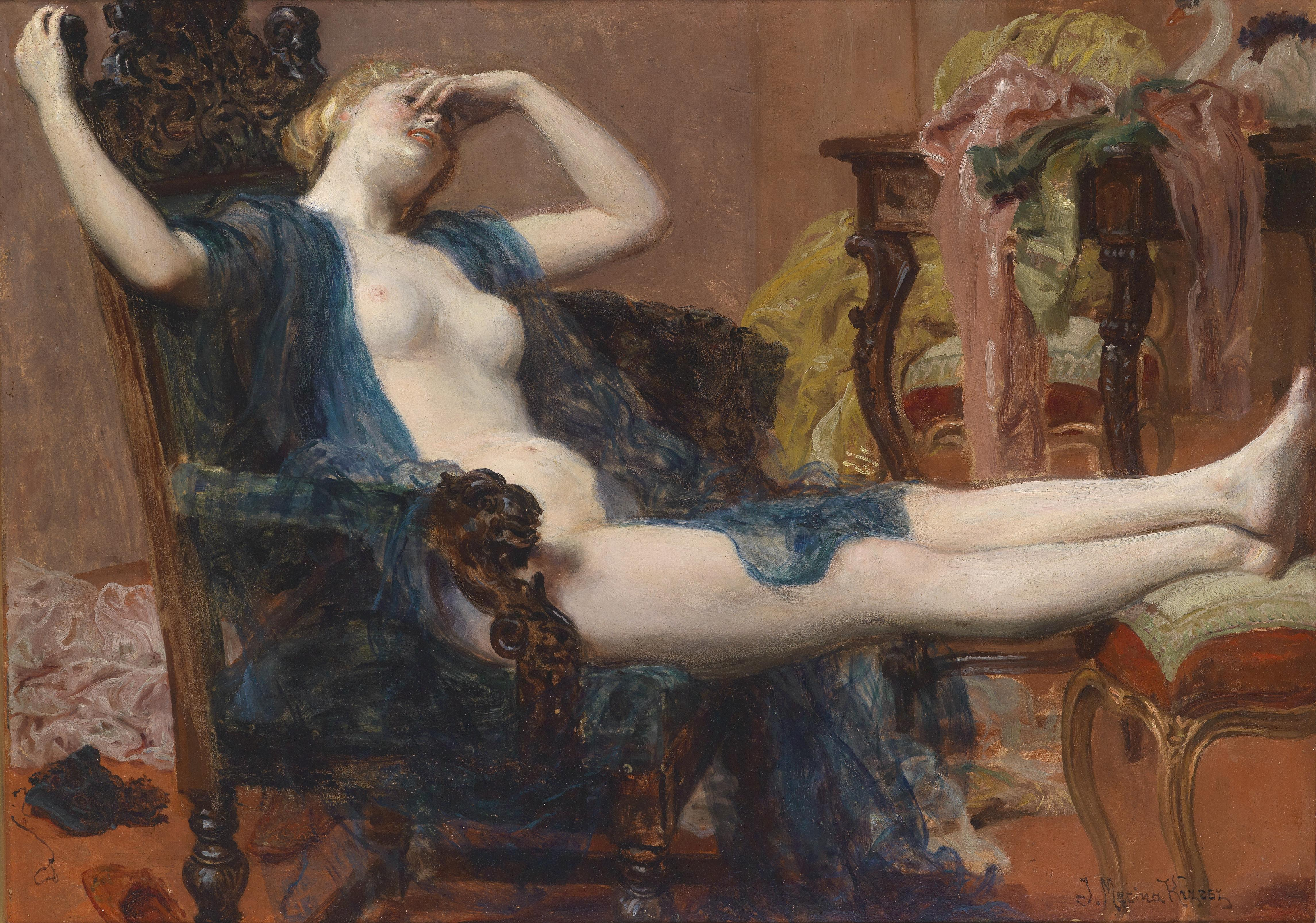 Tagträume, signiert J. Mecina-Krzesz, Öl auf Karton, 52 x 72 cm